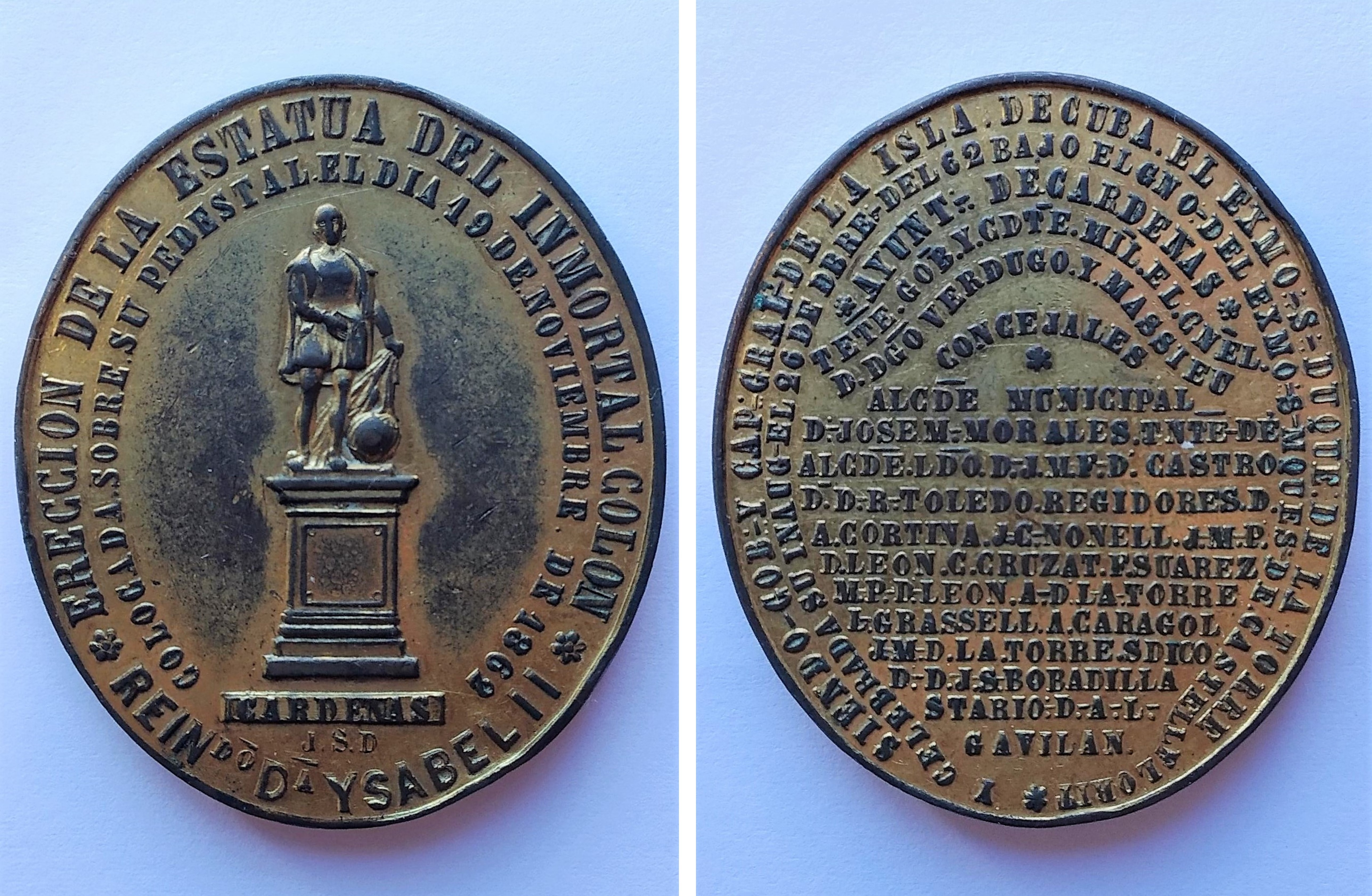 Medalla conmemorativa del levantamiento de una estatua de Cristóbal Colón en Cárdenas (Cuba), fechada en 1862. Material: bronce dorado. Medidas: 41 x 35,5 mm. Peso: 24,35 gr. Ejemplar perteneciente a la Colección TCP, España.